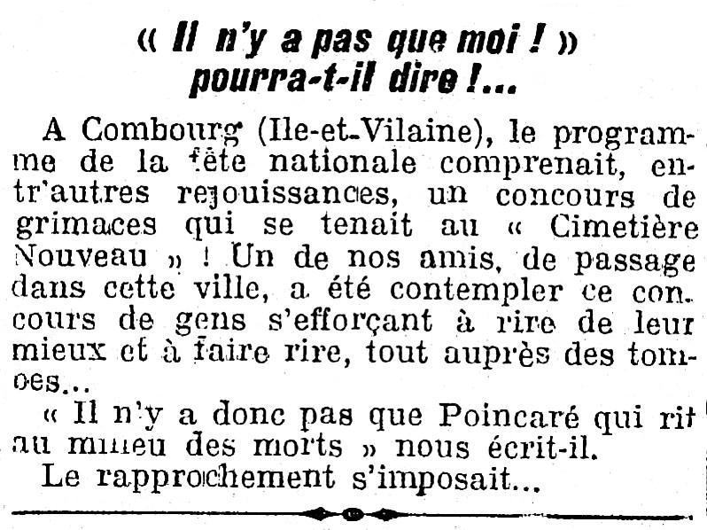 Compte-rendu de la fête nationale française du 14 juillet 1922 à Combourg où s'est déroulé un concours de grimaces, avec une allusion à Raymond Poincaré.